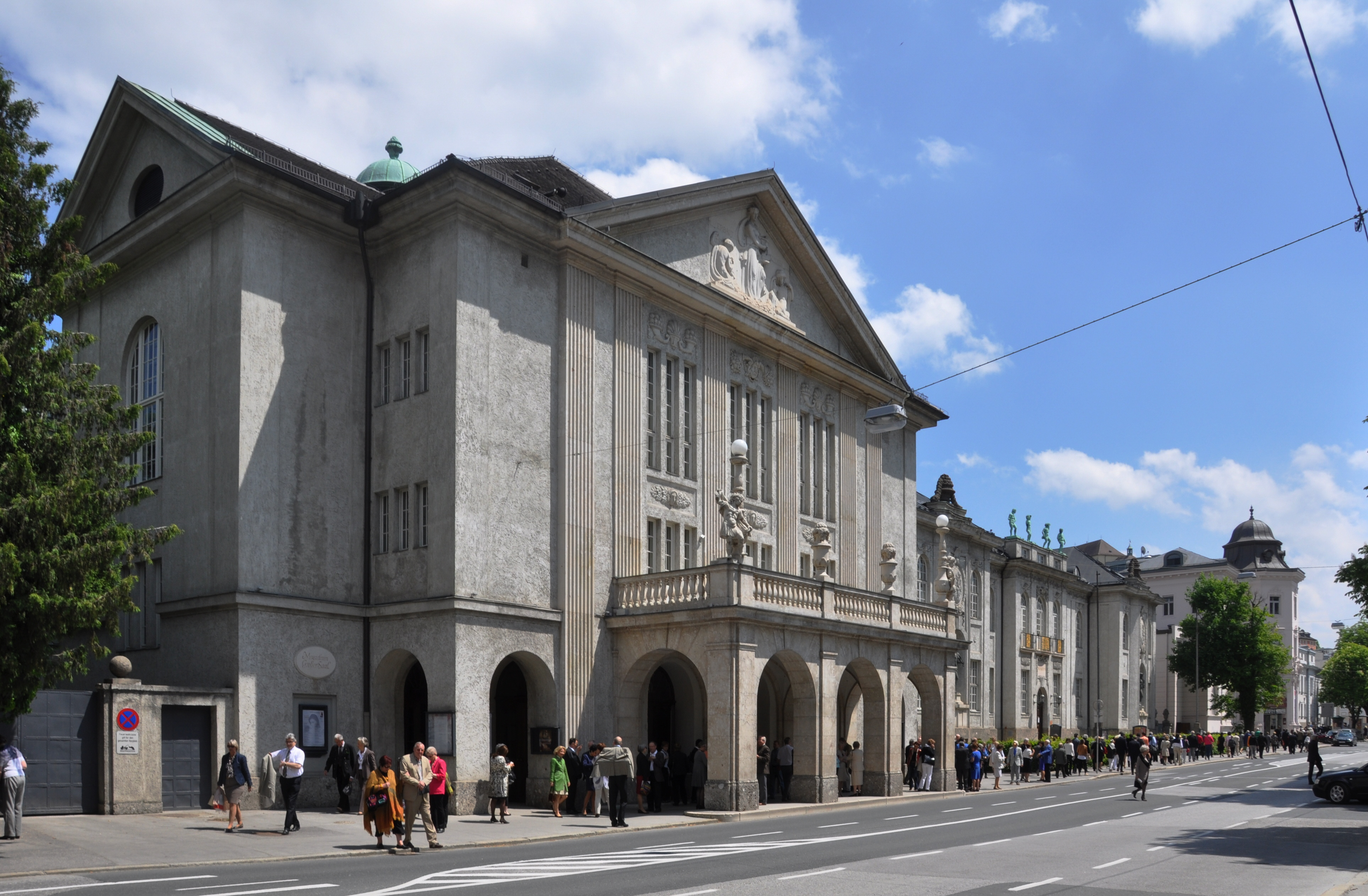 Salzburg, Mozarteum, Großer Saal, Außenansicht zur Schwarzstraße